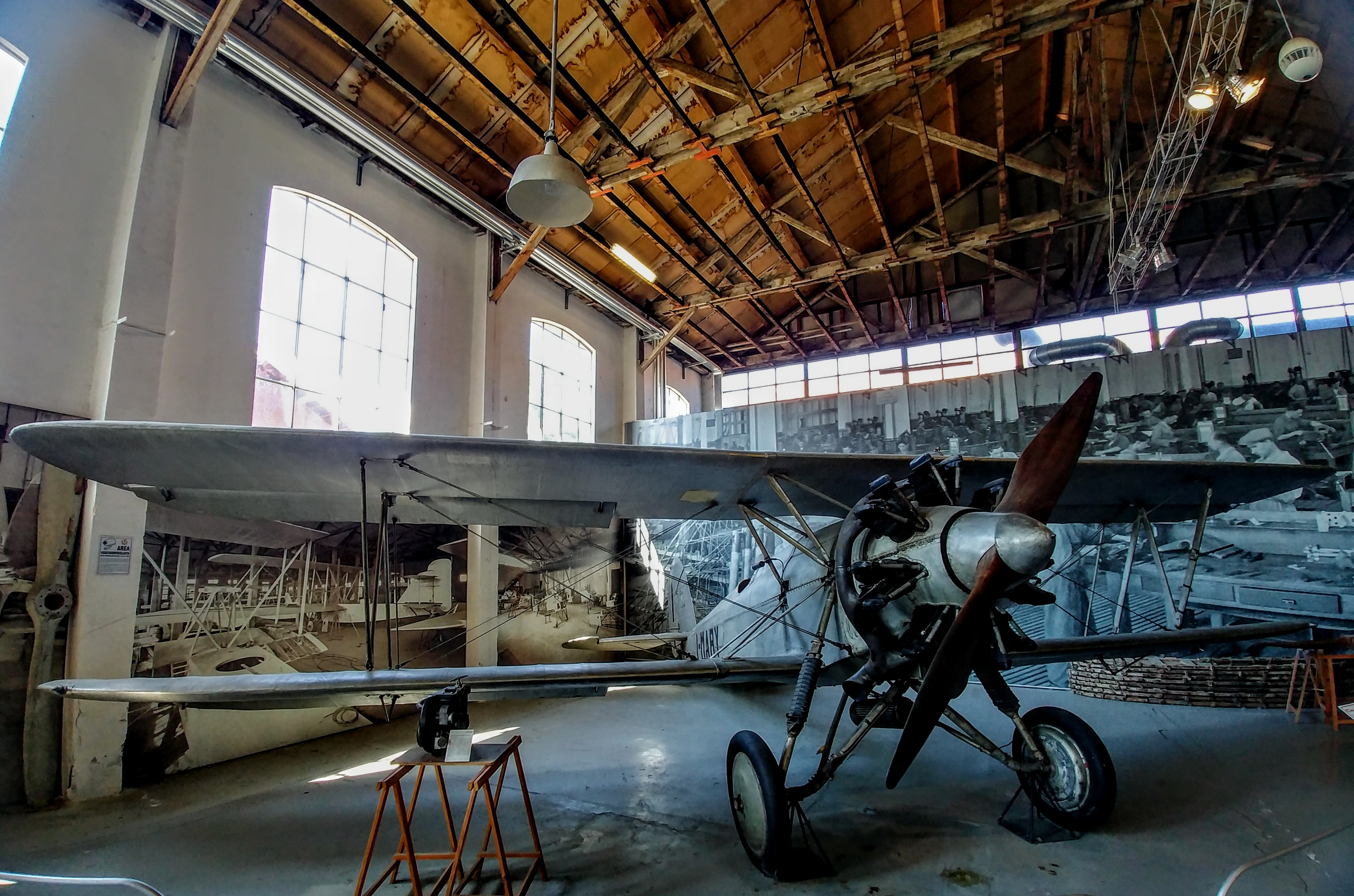 Caproni Ca.13, aereo acrobatico famoso tra le due guerre